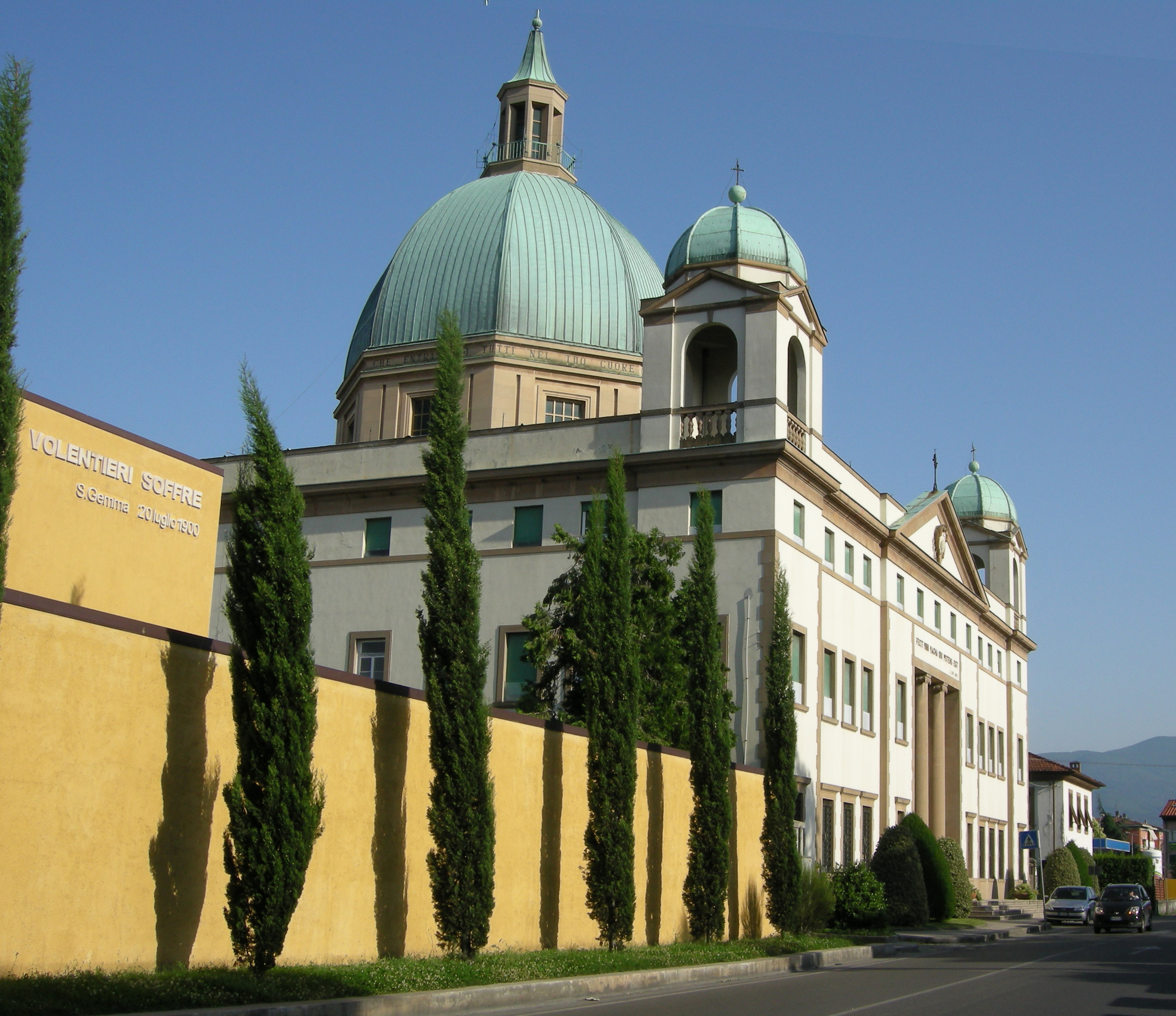 Lucca, monastero-santuario di Gemma Galgani